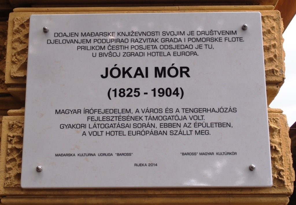 Erinnerungstafel für den ungarischen Schriftsteller und Journalisten Mór Jókai (1825-1904) in Rijeka, Kroatien